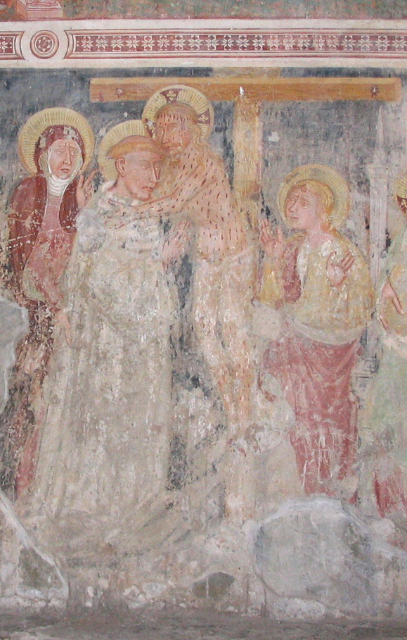 Deposizione; dettaglio dell'affresco attribuito al cosiddetto "Maestro della Deposizione" e datato al XV secolo. Chiesa di San Giorgio in Lemine (ad Almenno San Salvatore, Bergamo). Fotografia di Giorces.